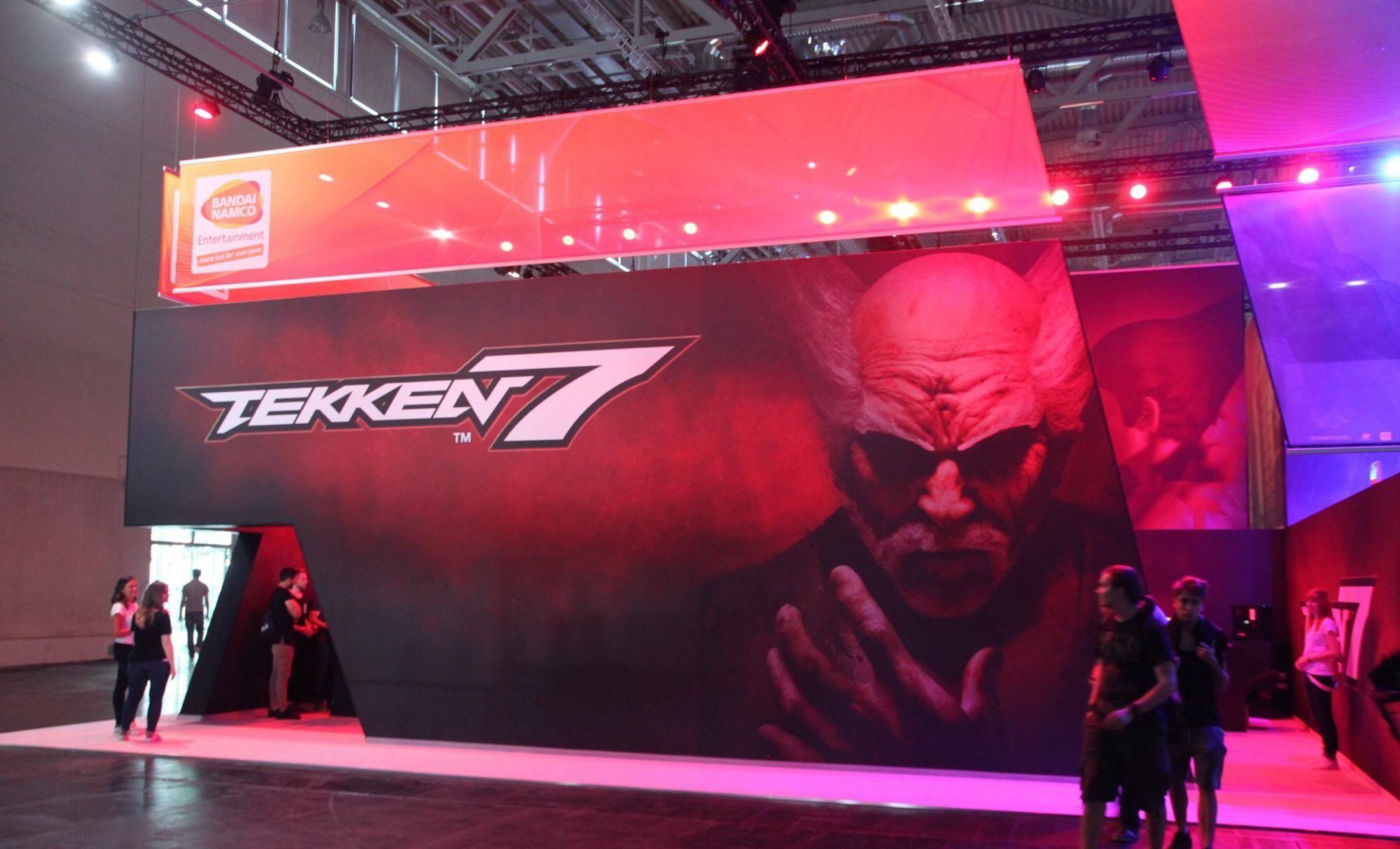 Gamescom 2016 impressions